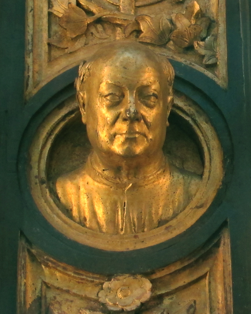 Porta del paradiso dopo il restauro, testine 06 autoritratto Lorenzo Ghiberti